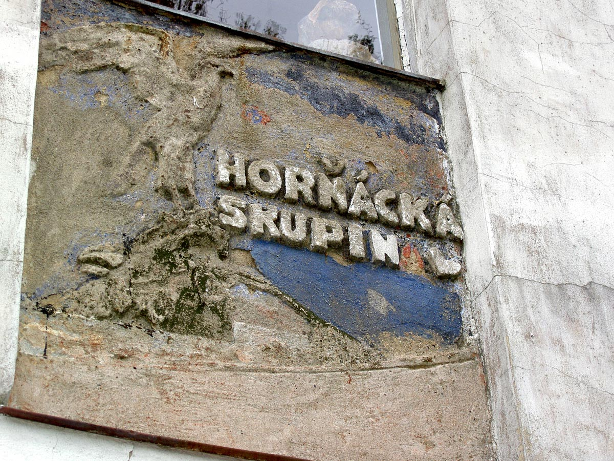 Detail z malovaného reliéfu pavilonu na Strážné Hůrce